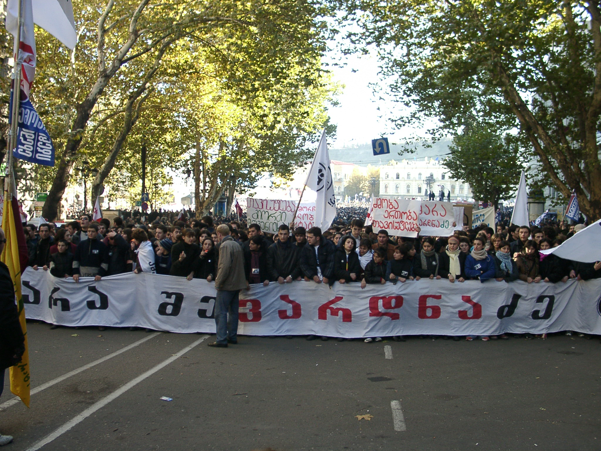 Tbilisi, Rose Revolution 2003.